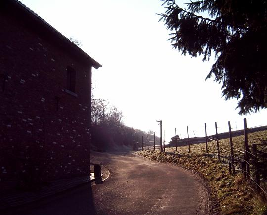 Limburgs: Ingwege aan de voot van de Keuteberg